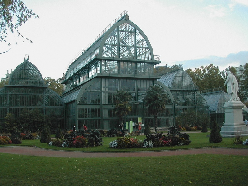 Grande serre au parc de la Tête d'Or, Lyon, France